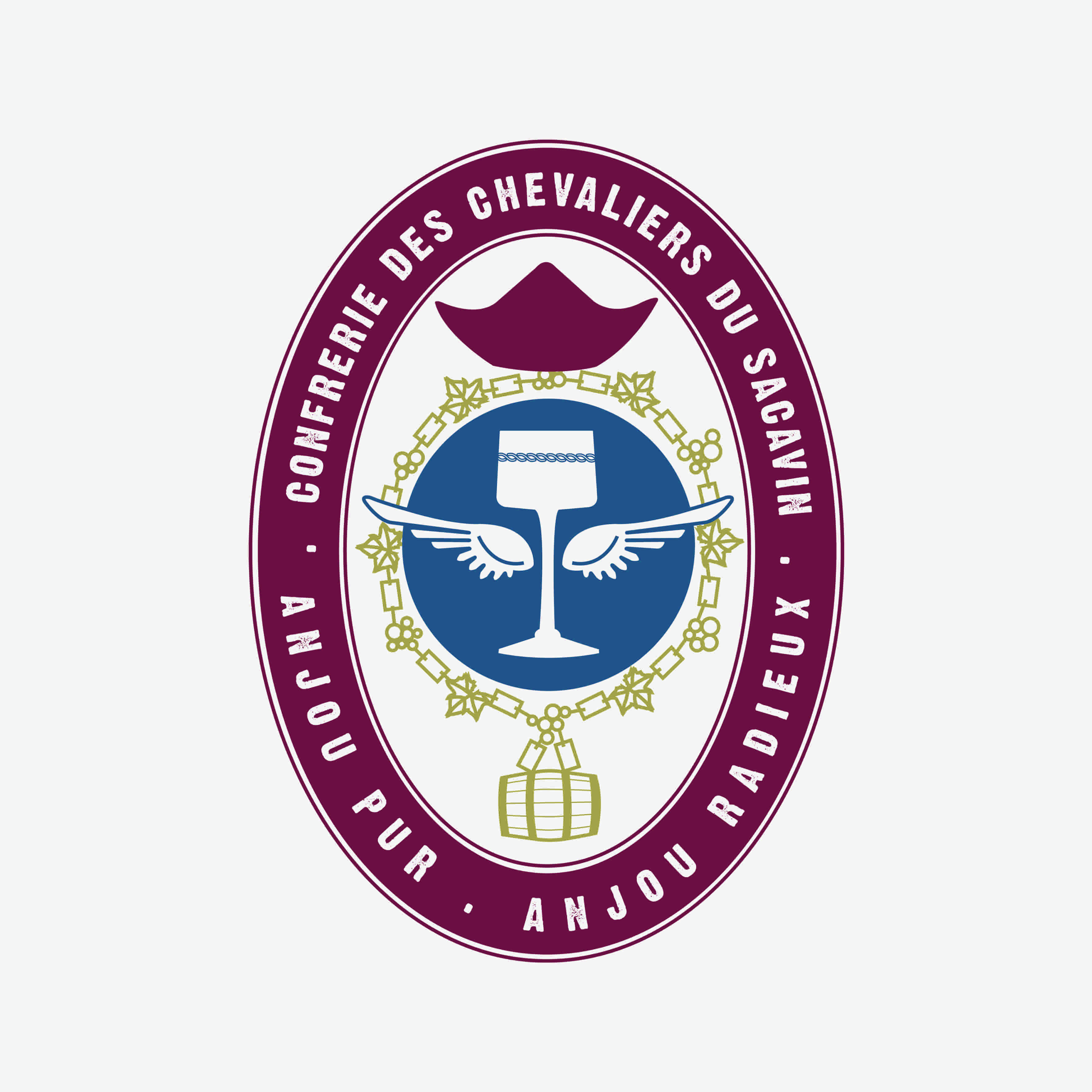 Logo